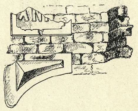 Беларуская (тарашкевіца): Смальяны (Smaljany), замак Белы Ковель (Bieły Koviel)